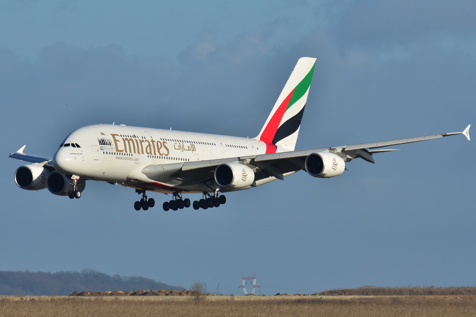 Photo prise à l'aéroport de Roissy-Charles de Gaulle (LFPG) en France. Picture take at Roissy-Charles de Gaulle Airport (LFPG) in France.